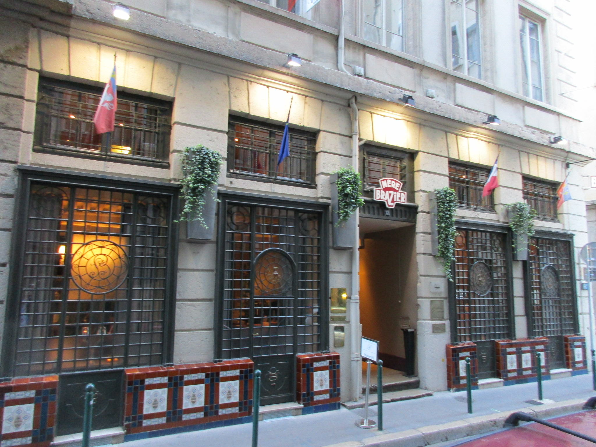 Restaurant Mère Brazier, 12 rue Royale à Lyon ( intersection de la rue Royale et de la Rue Eugénie Brazier